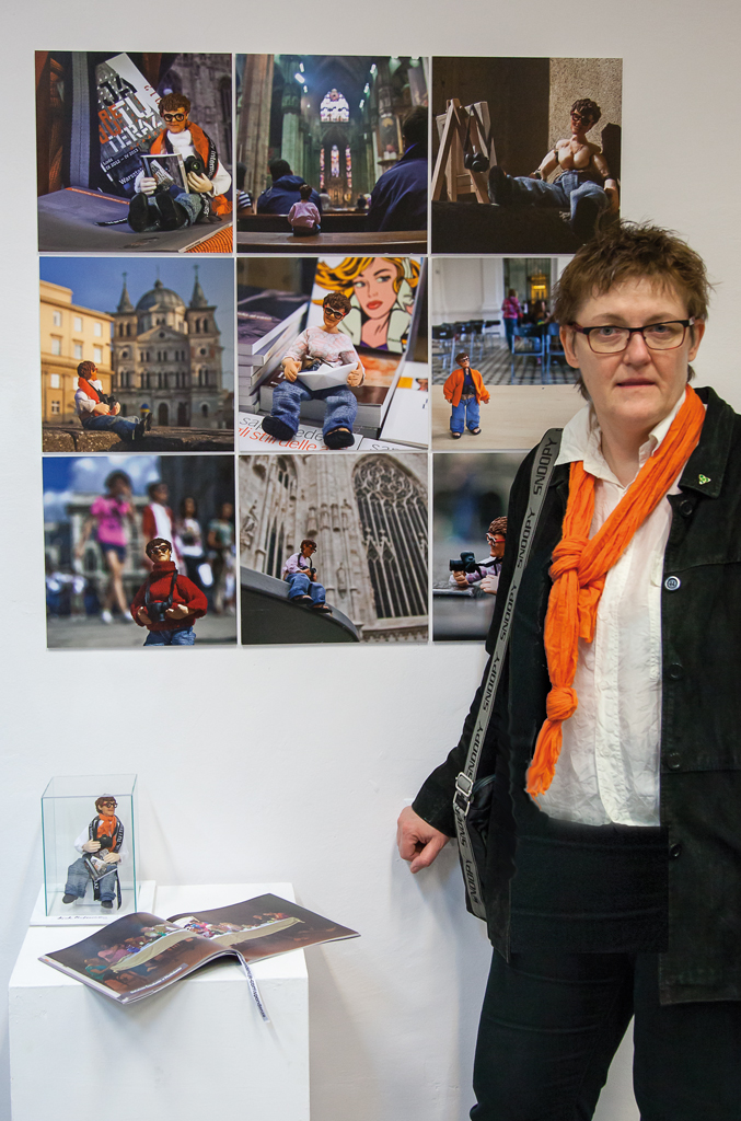 5 Międzynarodowy Festiwal Sztuka i Dokumentacja - Sztuka - Obiekt - Zapis